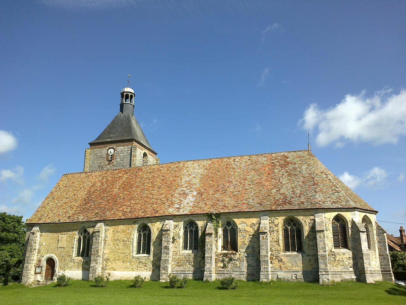 mur sud de l'église de Prouais, Eure-et-Loir, France. 18052015.